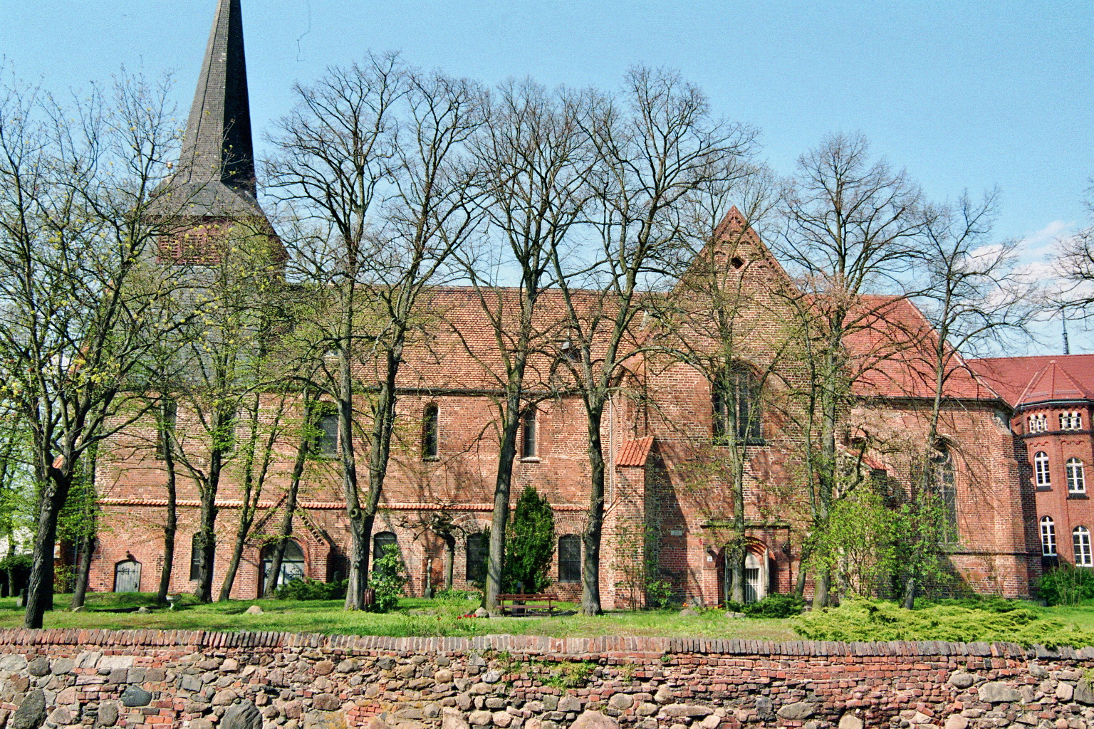 Außenansicht der Liebfrauenkirche Jüterbog